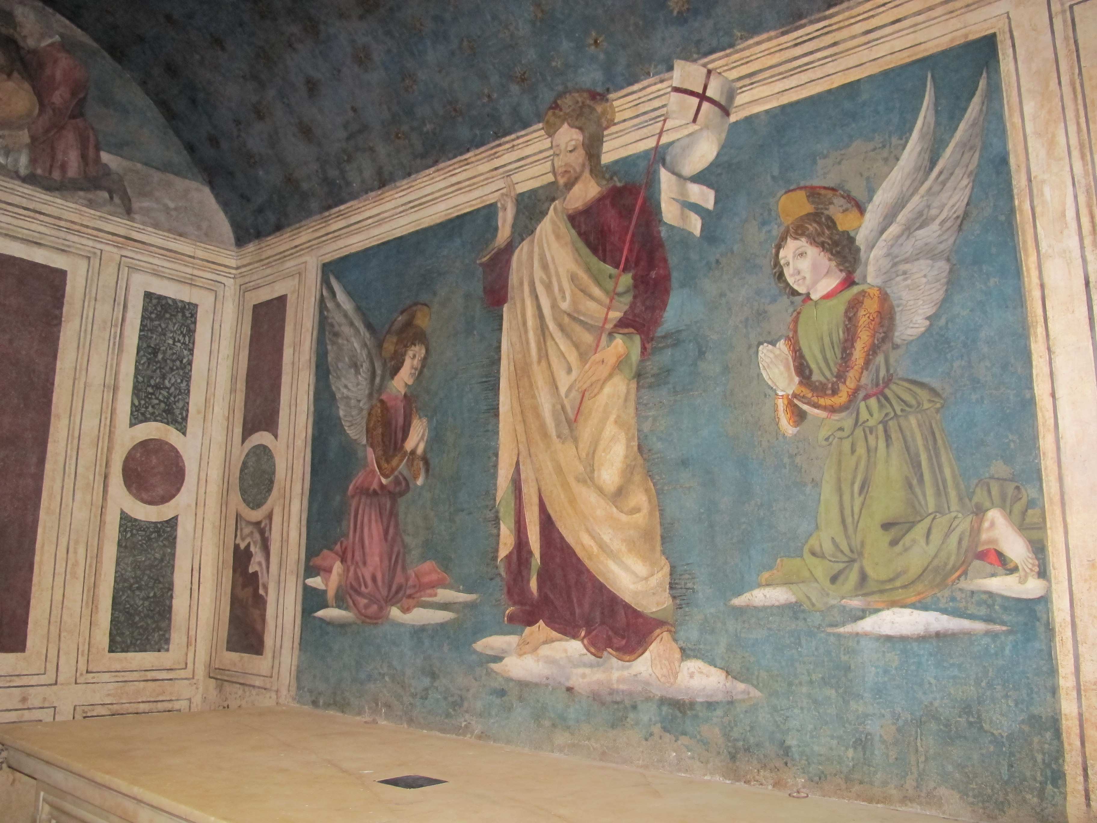 Tempietto dell'alberti restaurato, int. con affreschio giovanni da piamonte